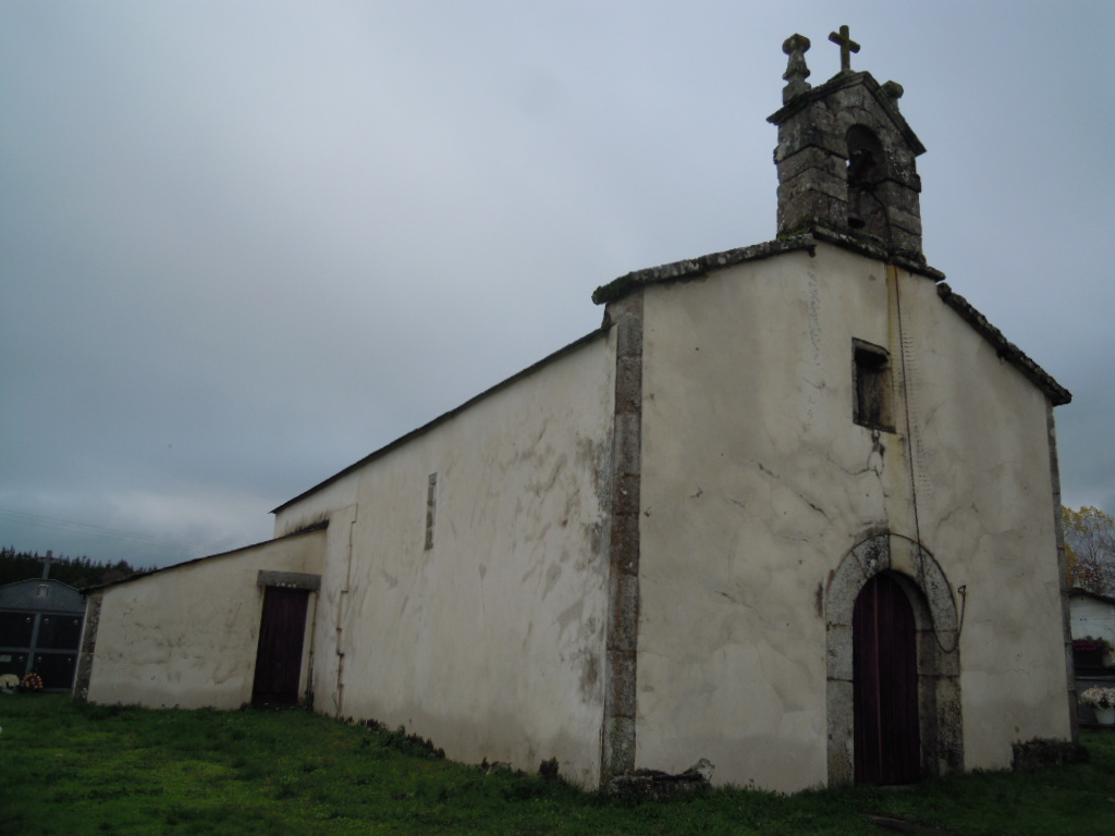 Igrexa de Santo Estevo de Paderne (Castroverde).